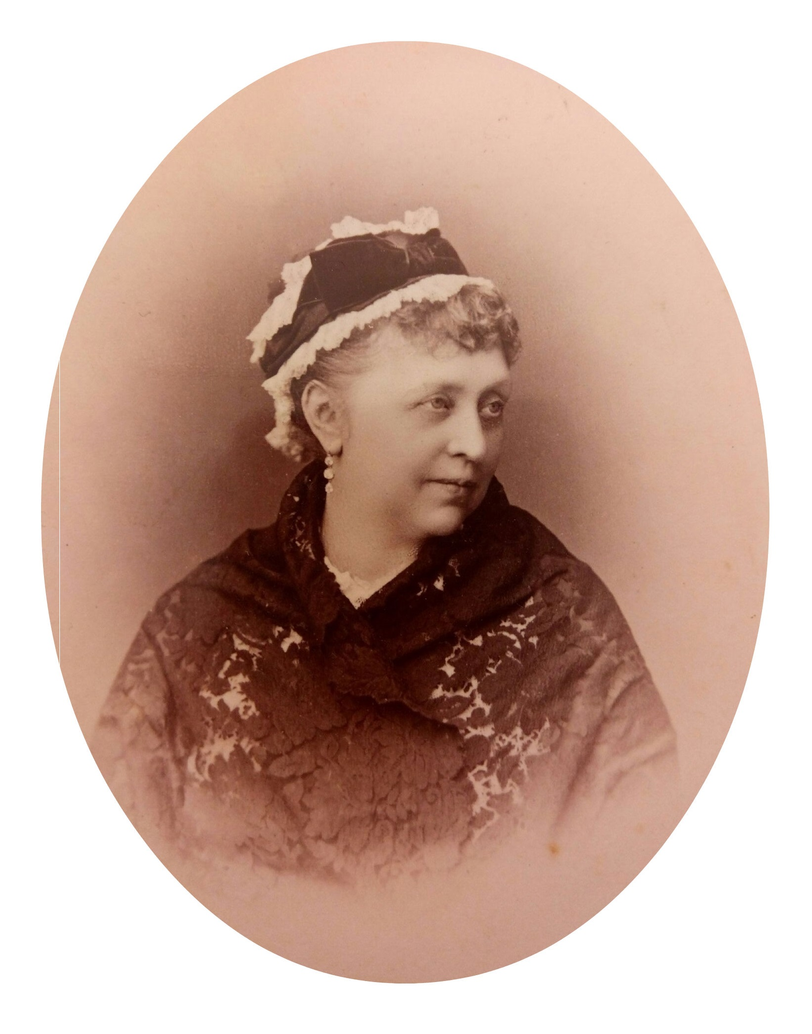 Графиня Елена Дмитриевна Канкрина, ур. Башмакова (1829—1899)